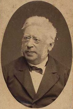 Frederik "Fritz" Christian Holsten-Lehn-Charisius (1796-1888), Danish baron